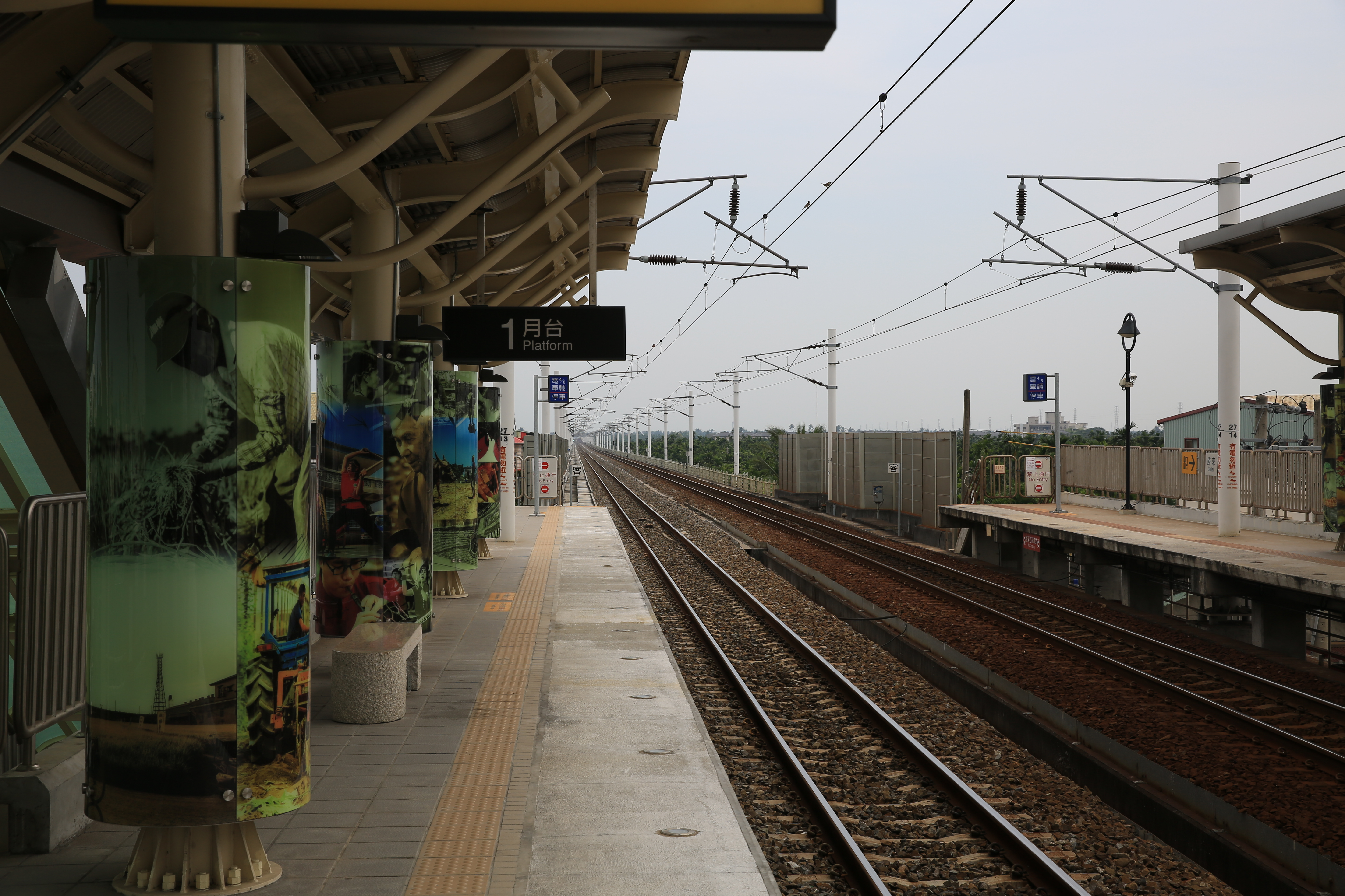 台鐵歸來車站第一月台末端